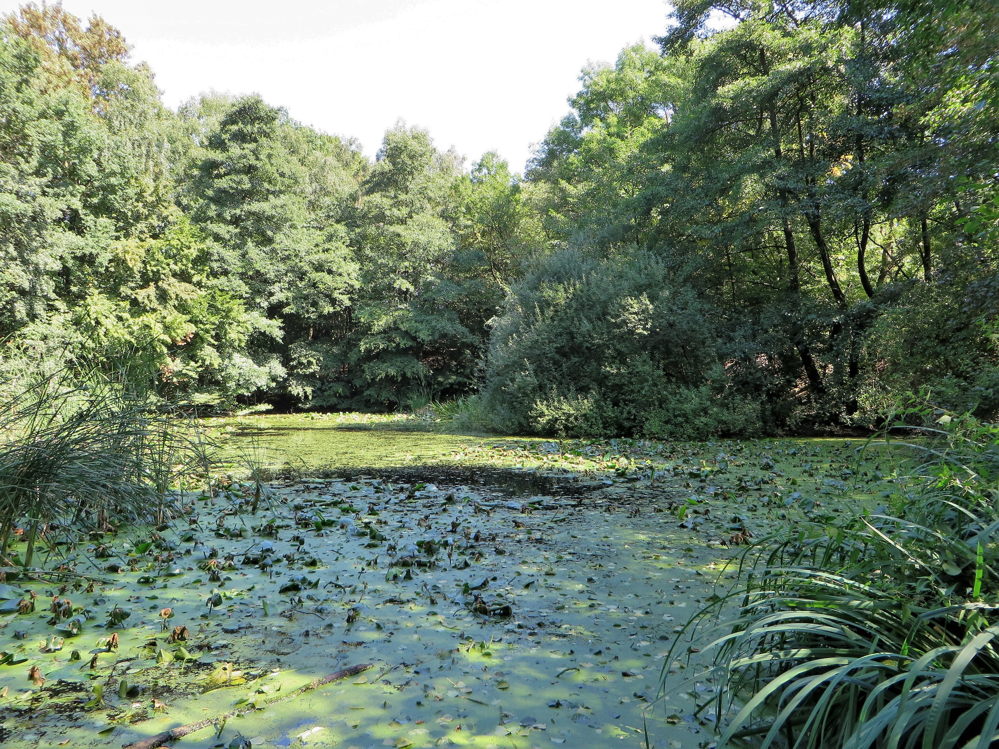 Geschützter Landschaftsbestandteil 1.4.2.23 „Humpertteich/Humpertbach“ in Hagen, östlich des Ischeland-Stadions. Es handelt sich um einen Bachsiepen mit naturnahem Gehölzbestand und einer Teichanlage (Bachstau).